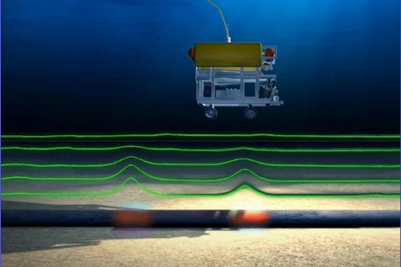 Устройство с дистанционным управлением для испытаний подводных трубопроводов.